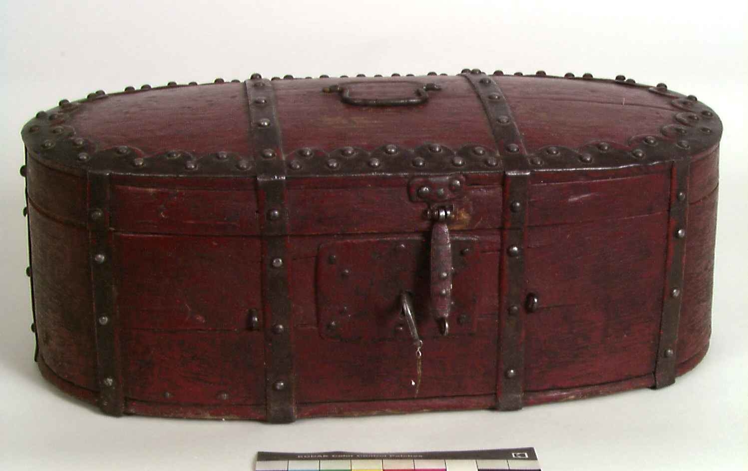 Samisk bomme fra Vefsn i Nordland. Sidene er sveipet av furu og lokket er av bjørk. Foto: Anne-Lise Reinsfelt / Norsk Folkemuseum NFSA.1890.